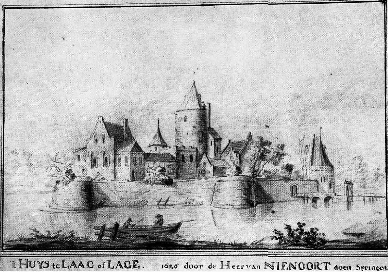 Burg Lage, Burcht Lage